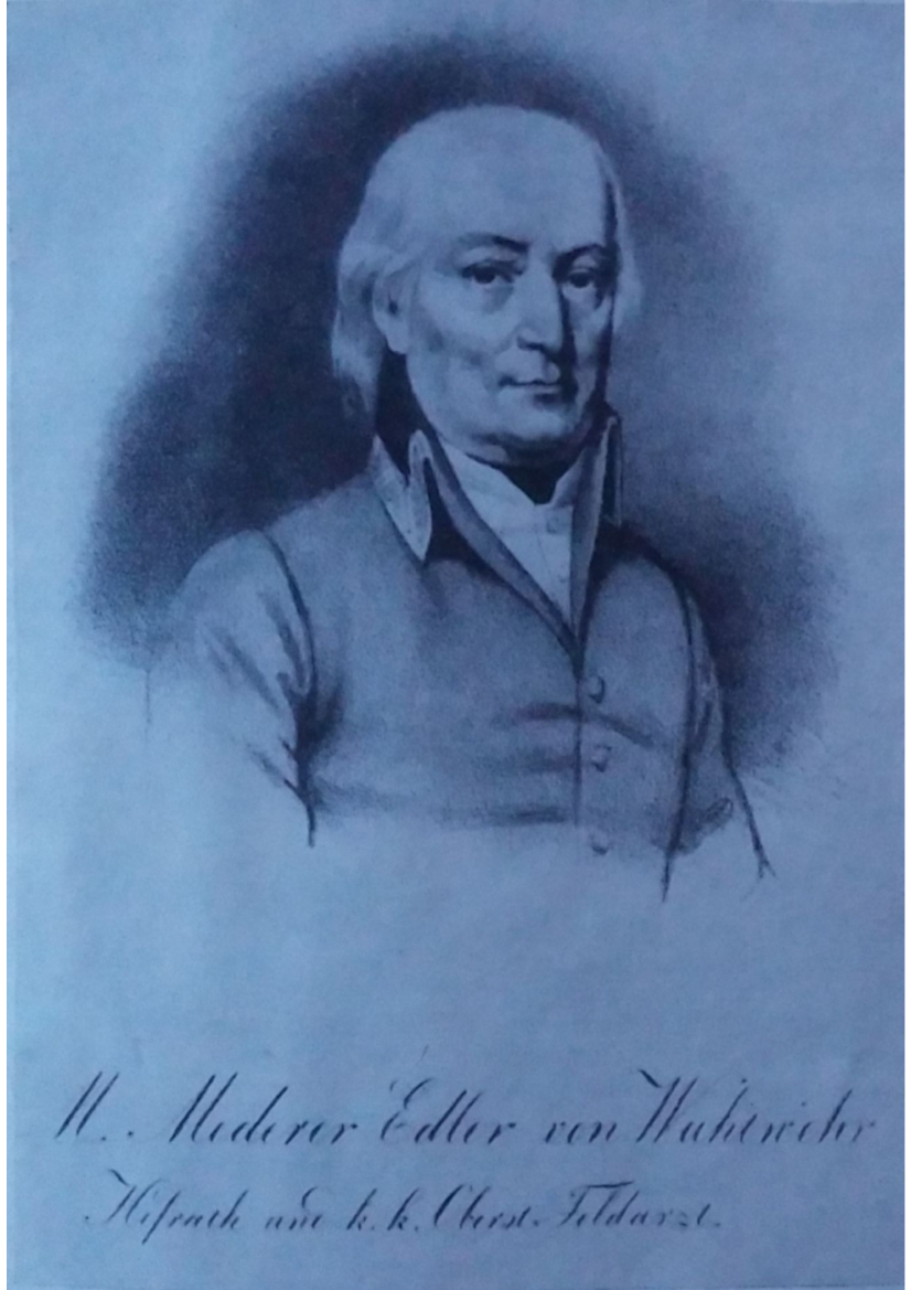 Lithografie